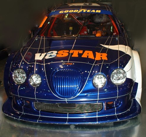 V8-Star Essen Motorshow 2001